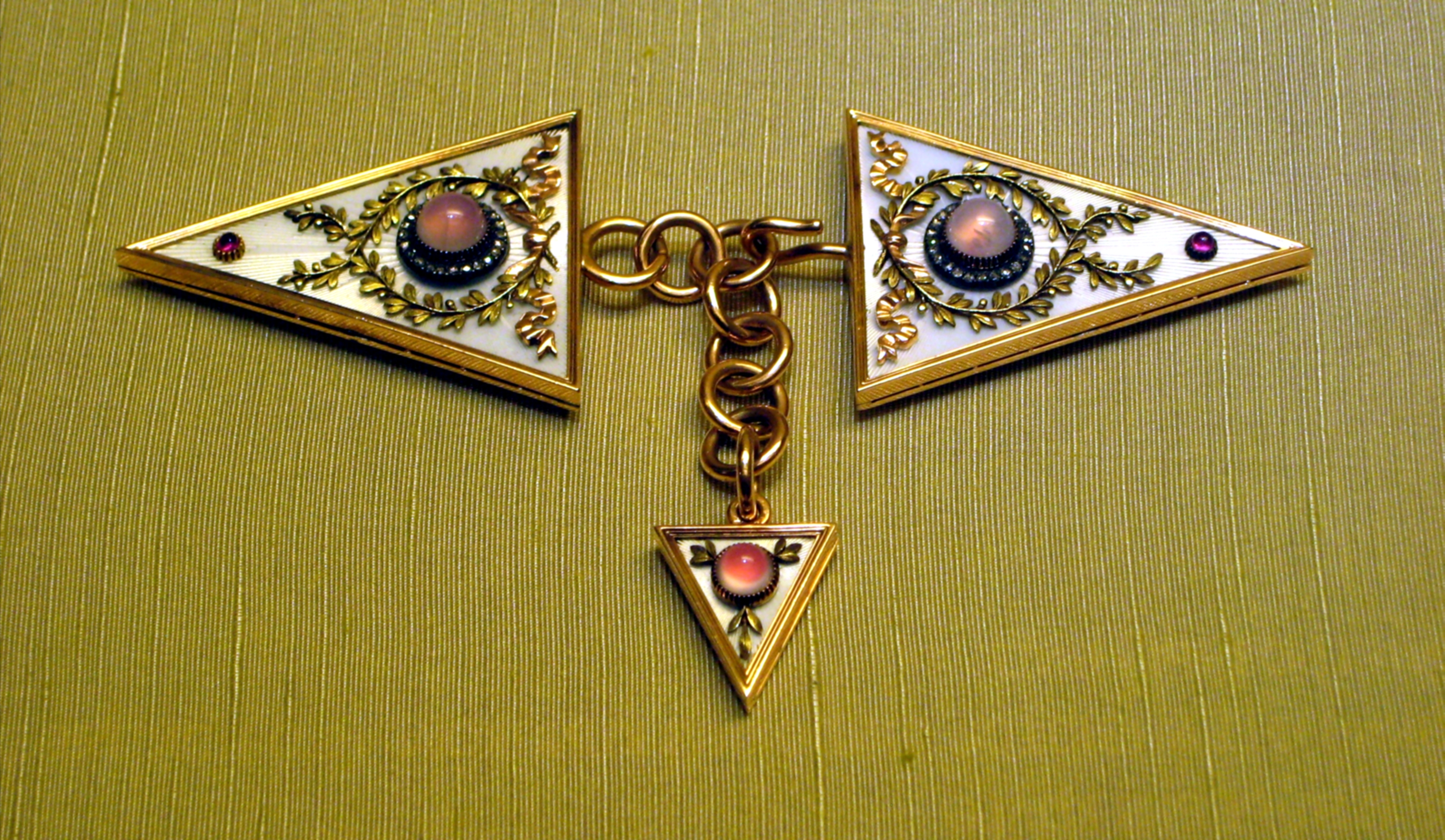 Аграф. СПб, 1903-1904. Фирма Фаберже, мастер Г. Вигстрем. Халцедоны, алмазы, рубины, цветное золото, эмаль. Собрание А. Ружникова.